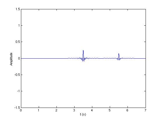 Filtrage adapté de l'image Chirp_before.jpg